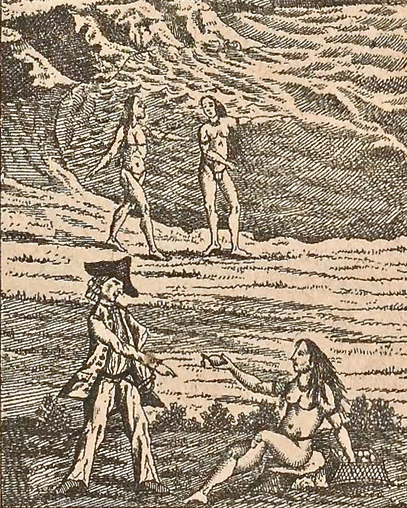 Indigene als Edle Wilde, Ausschnitt aus dem Titelbild von Nikolaus Joseph von Jacquin: Selectarum stirpium Americanarum historia, Wien 1763